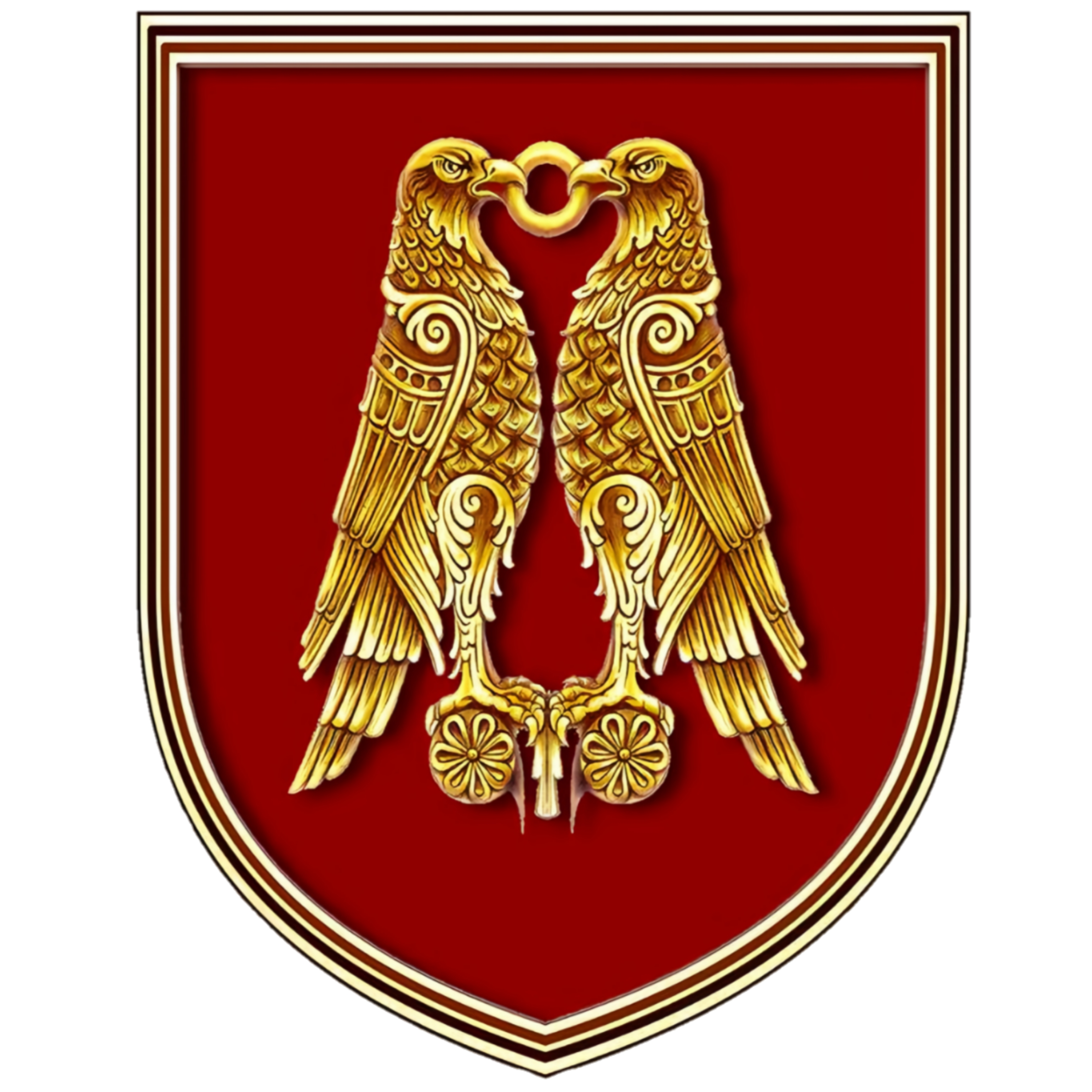 Արծրունիների զինանշանը